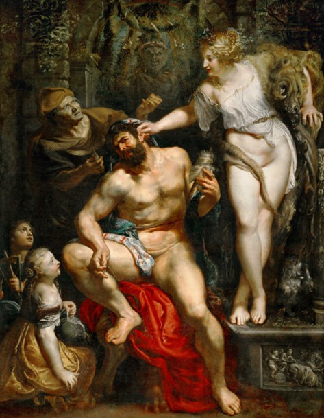 Herkules am Spinnrocken, Omphale mit dem Löwenfell und der Keule des Helden; Apollodoros II, 6,3